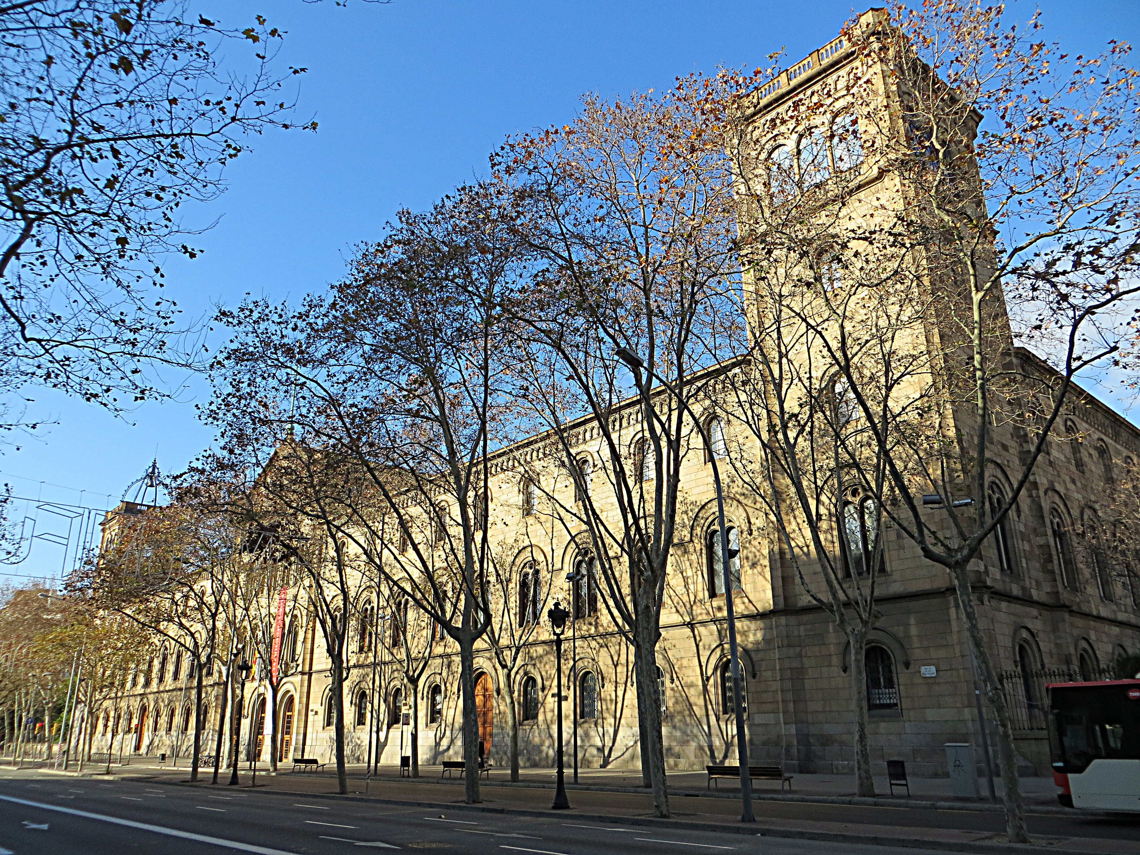 Universitat de Barcelona